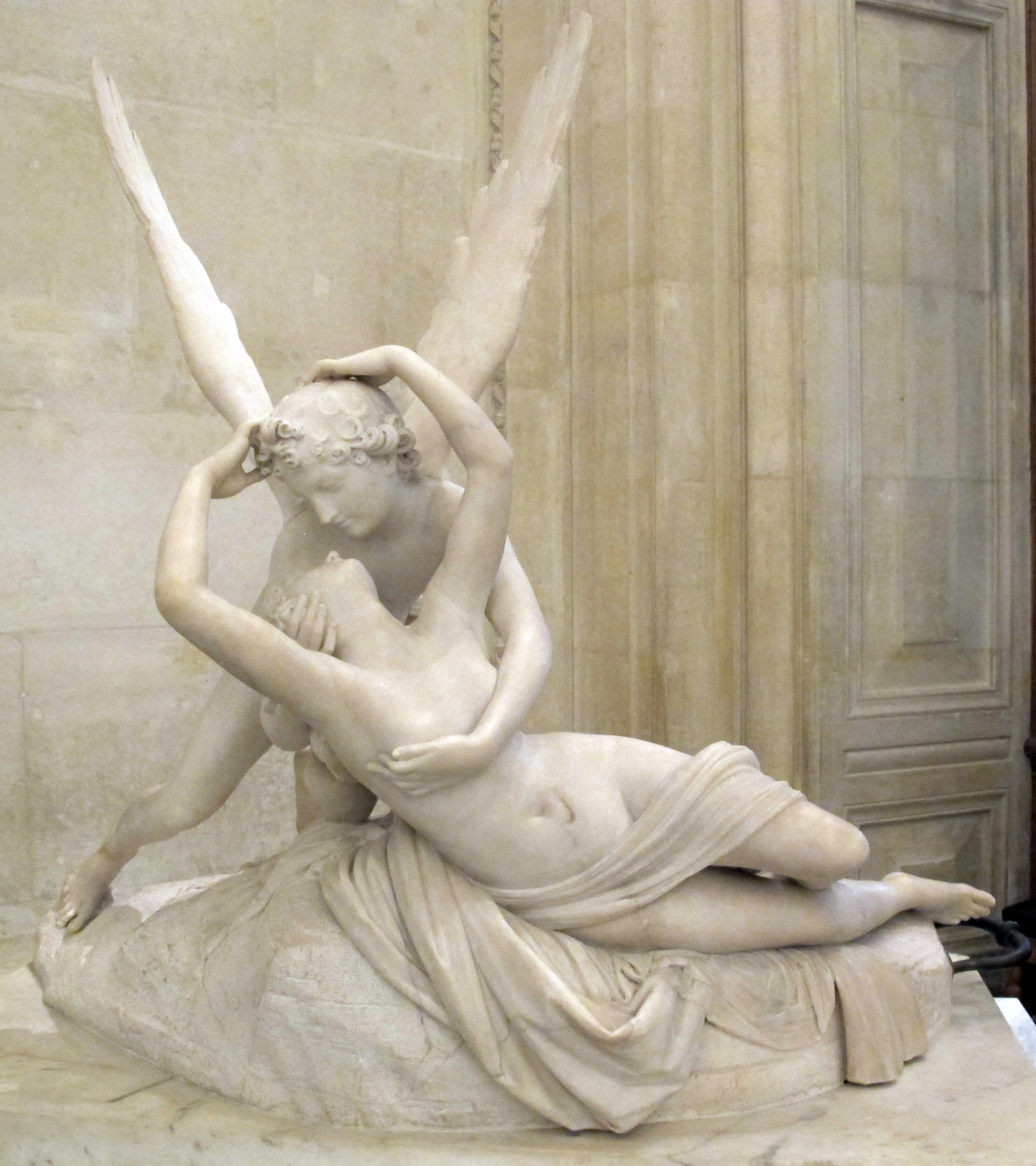 scultura italiana al Louvre